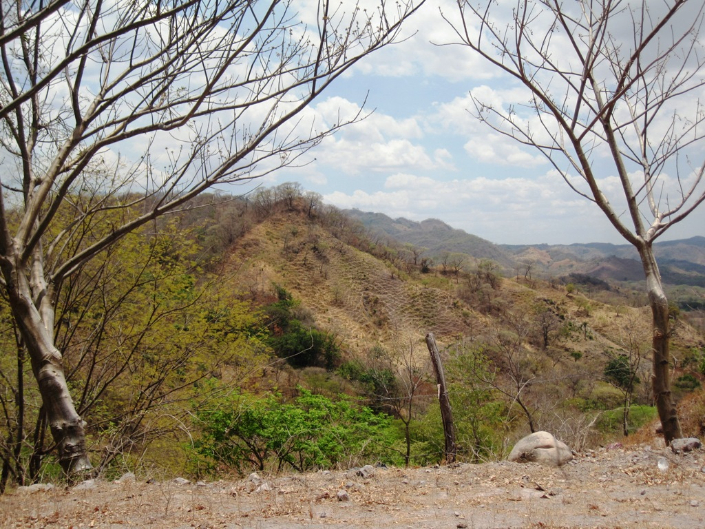 El Sauce, Nicaragua